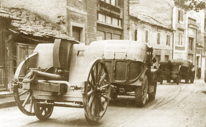 traino obice